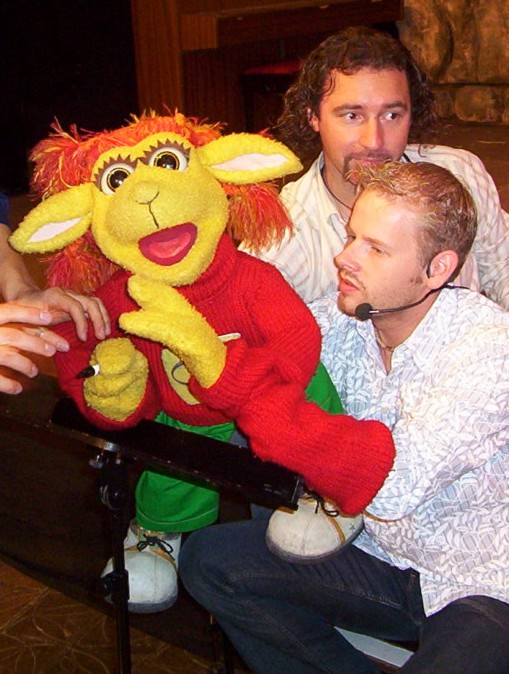 "Chili das Schaf" puppet and creators Tommy Krappweis and Erik Haffner, taken at "1. Fantreffen von Bernd das Brot"